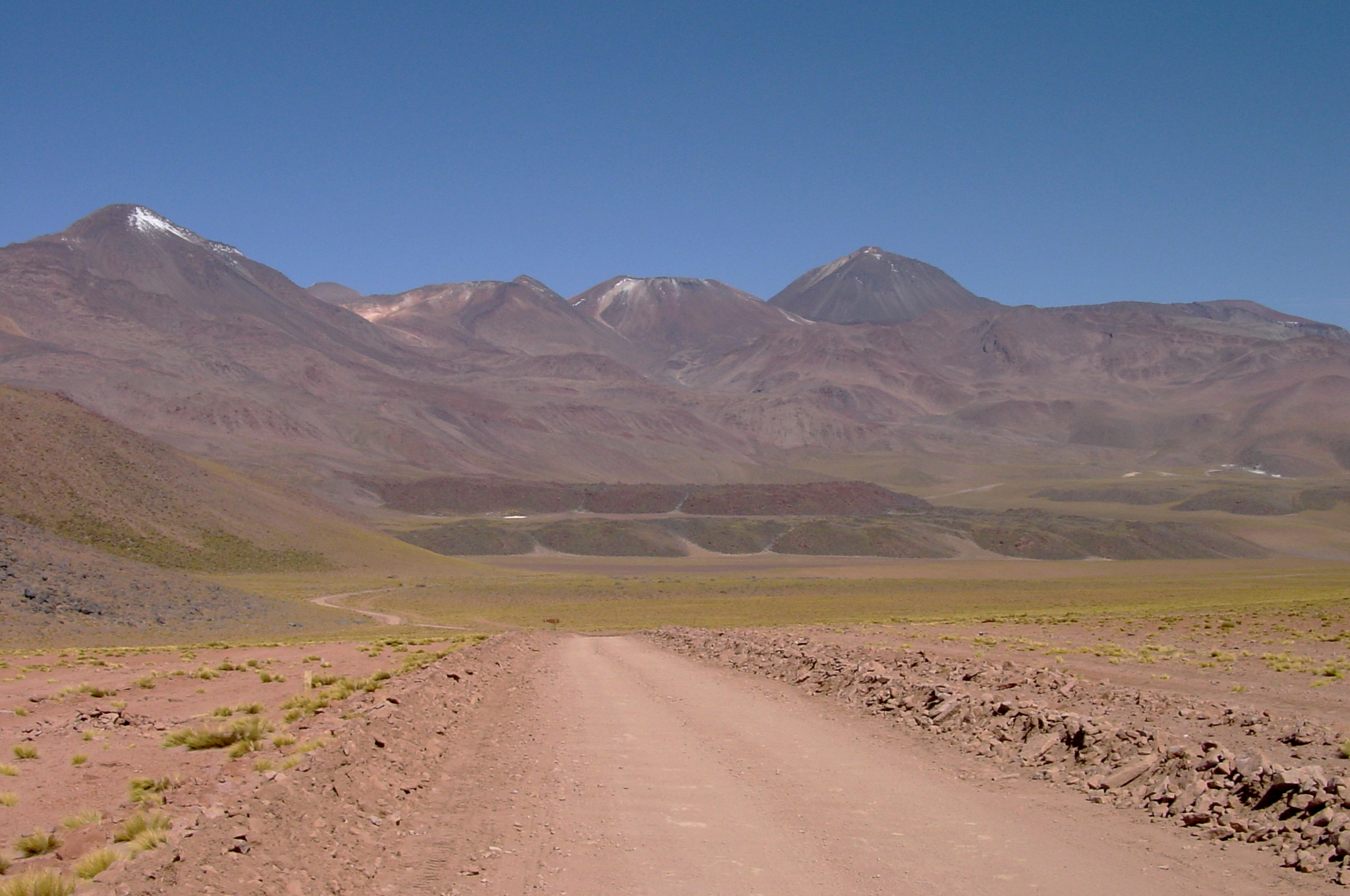 Volcans Sairecabur, Saciel, Cerro Curiquinca, Commune de San Pedro de Atacama, province de El Loa, région II, Chili